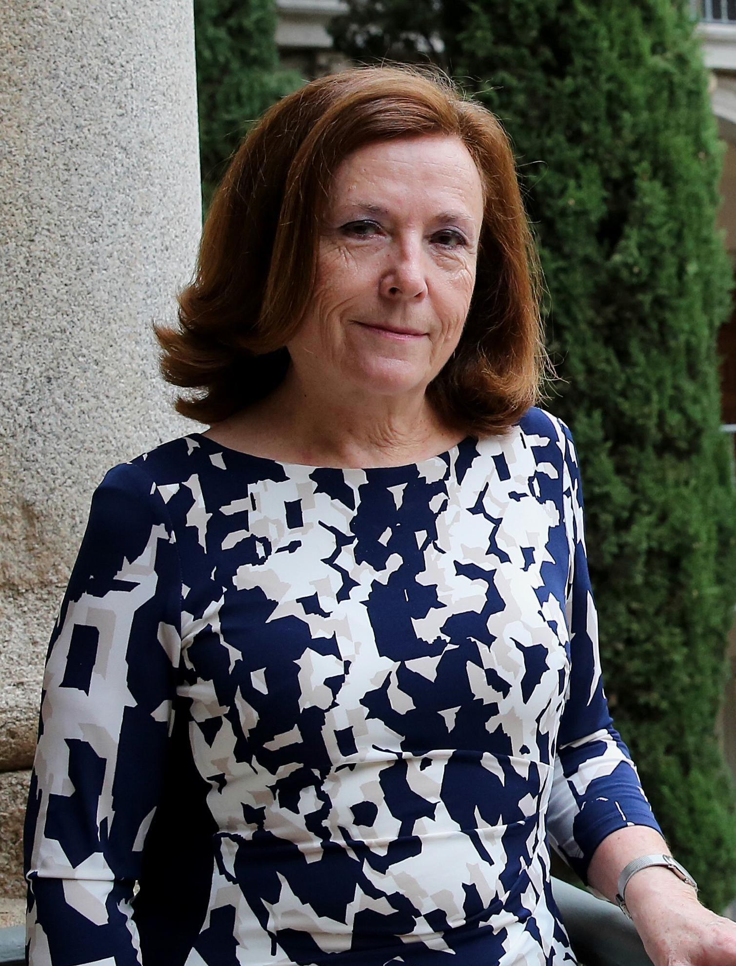 La filóloga Aurora Egido (Molina de Aragón, Guadalajara, 1946). Licenciada y doctora en Filología Española por la Universidad de Barcelona y catedrática emérita de Literatura Española de la Universidad de Zaragoza.